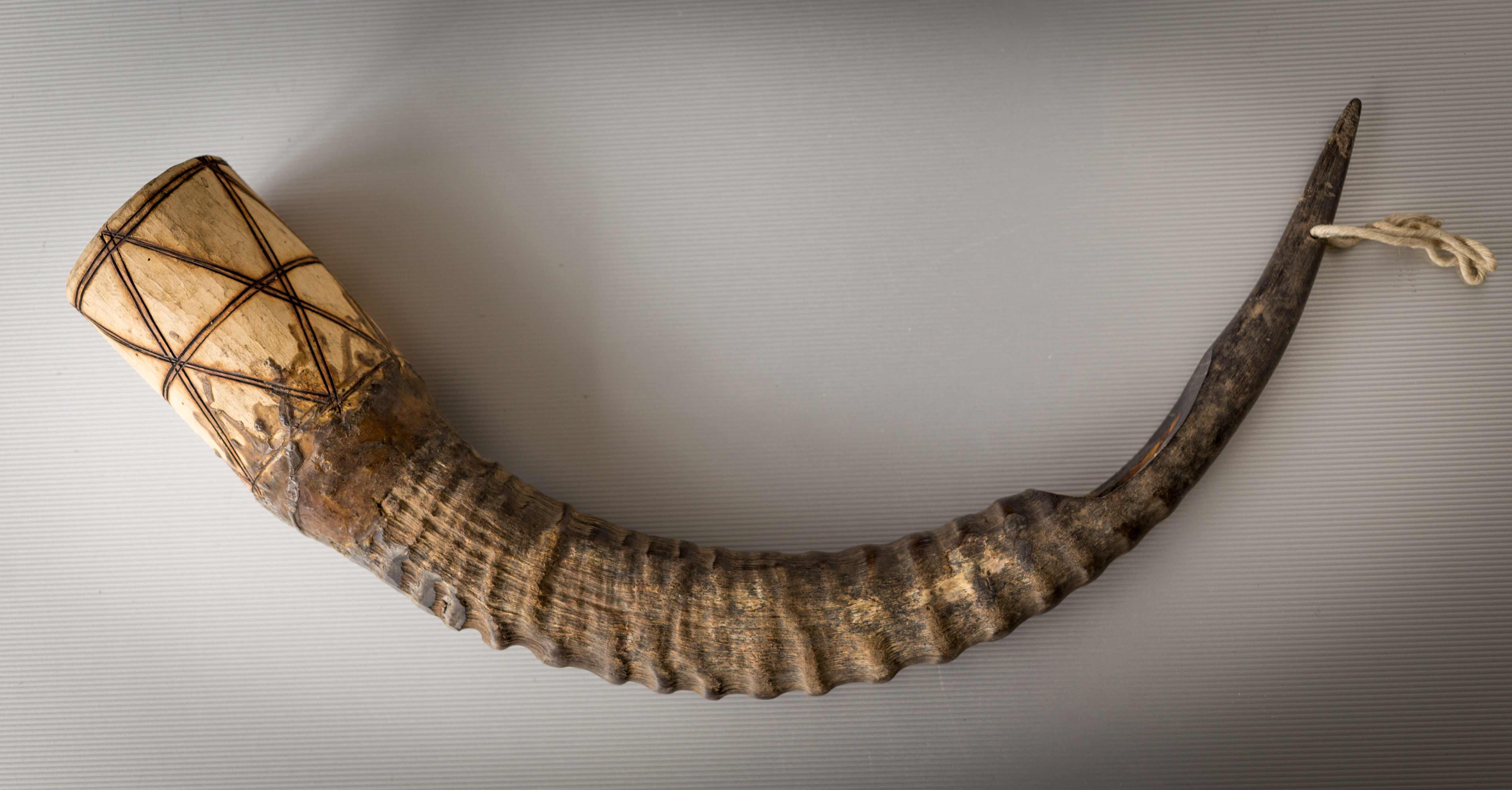 Instrument de musique aérophone. Provenance : Bamako, Mali (Bambara) Matériaux : végétal (bois, cire, coton) ; animal (corne d'antilope, laine, cire, cocon d'araignée) Collections d'objets ethnographiques de l'université de Strasbourg (cf. fiche détaillée dans la base de données Ethno de la Maison interuniversitaire des sciences de l'homme Alsace) N° d'inventaire : 2002.0.80